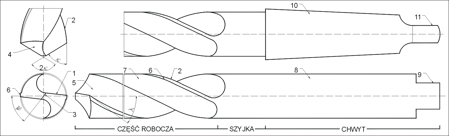 Geometria wiertła krętego. 1. Główna krawędź skrawająca. 2. Pomocnicza krawędź skrawająca. 3. Krawędź poprzeczna (ścin). 4. Powierzchnia przyłożenia. 5. Rowek wiórowy. 6. Pomocnicza powierzchnia przyłożenia (łysinka). 7. Rdzeń. 8. Chwyt walcowy. 9. Zabierak 10. Chwyt stożkowy Morse’a. 11. Płetwa. 2k Kąt wierzchołkowy. y Kąt pochylenia ścina. l Kąt natarcia.